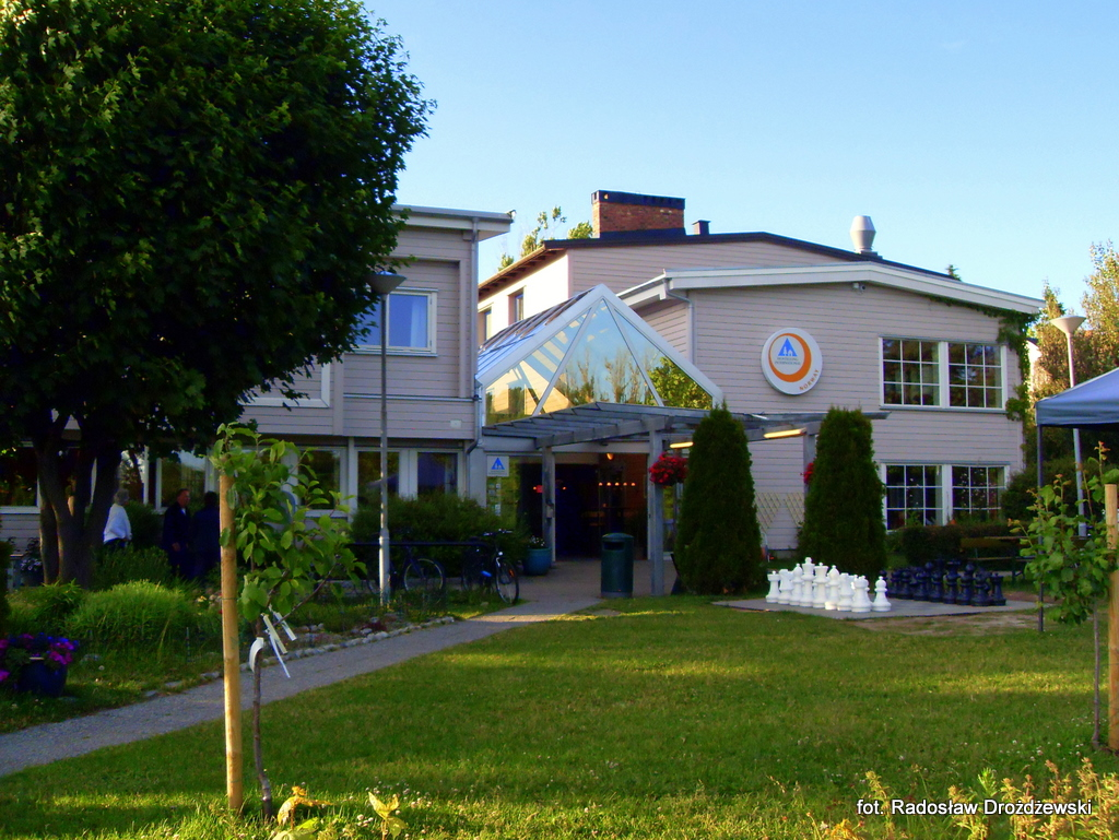 Hostel Haraldsheim w Oslo.